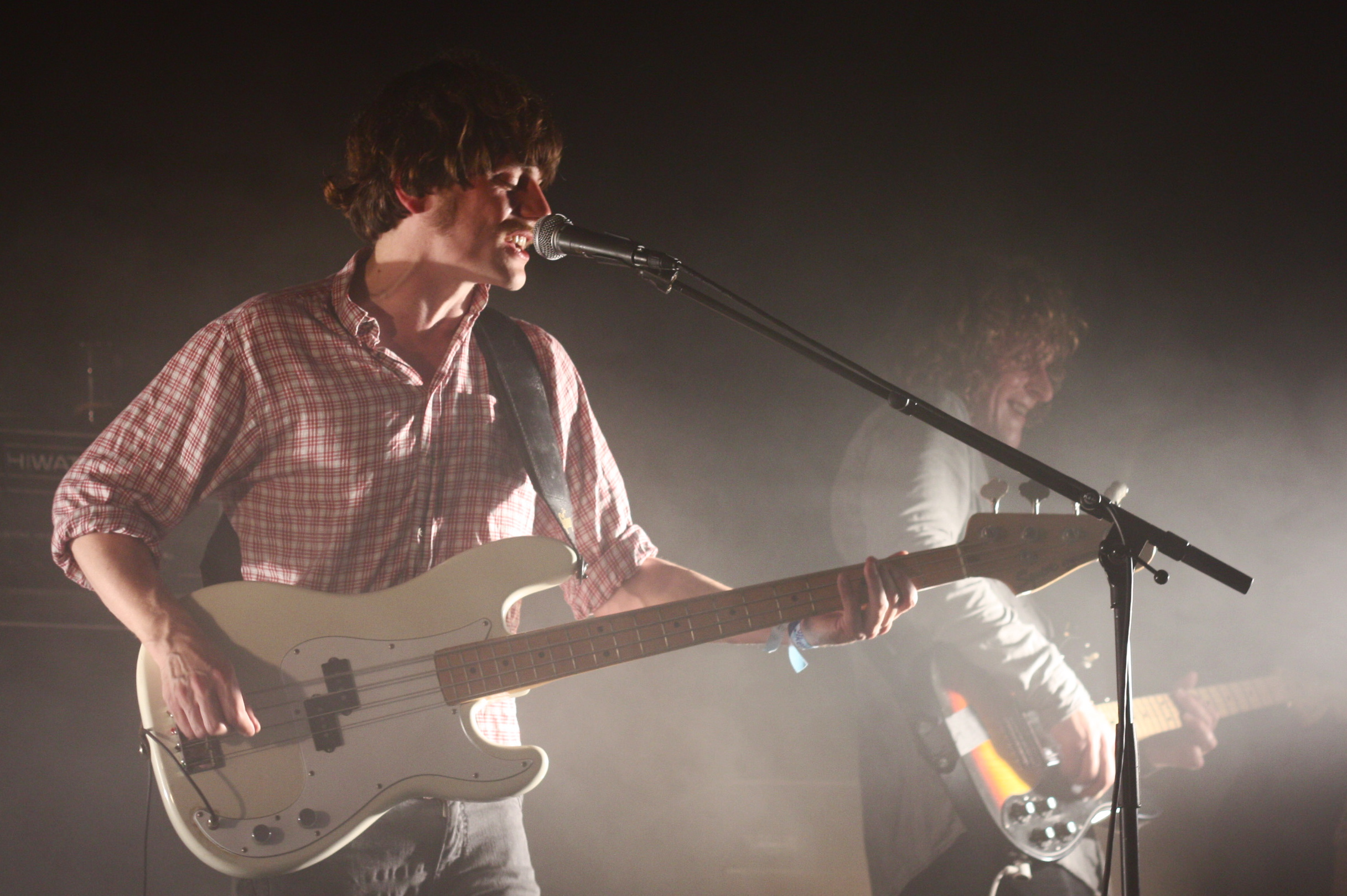 Øyvind Rørsud Gundersen